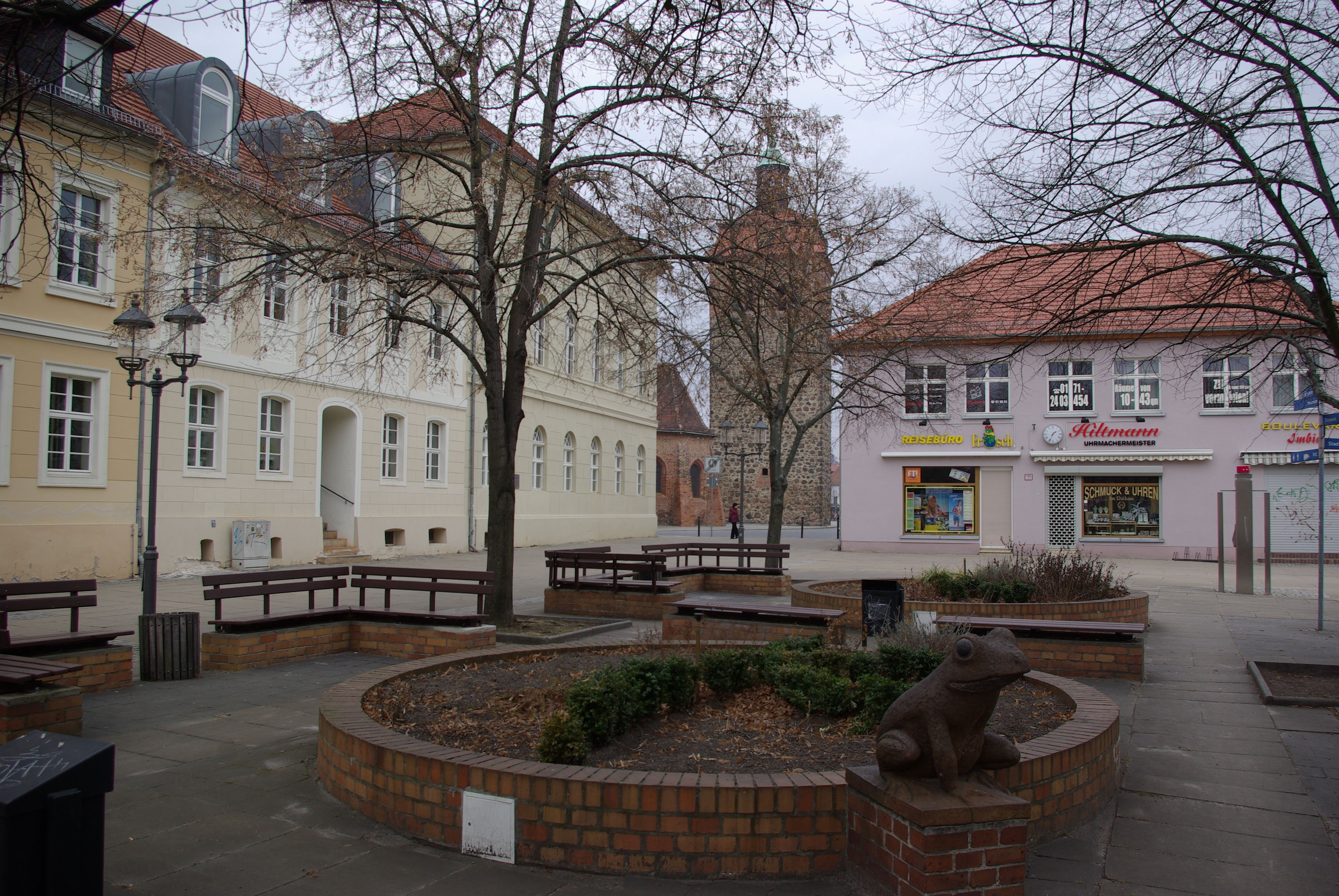 Luckenwalde in Brandenburg. Die Breite Straße mit Blick auf Rathaus, den Marktplatz und Marktturm. Sie bilden das Zentrum der Stadt.